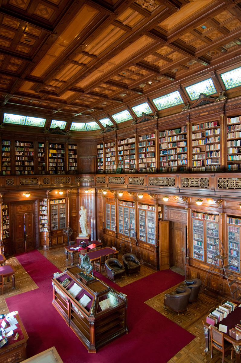 Palacio Legislativo. Ubicada en el departamento de Montevideo